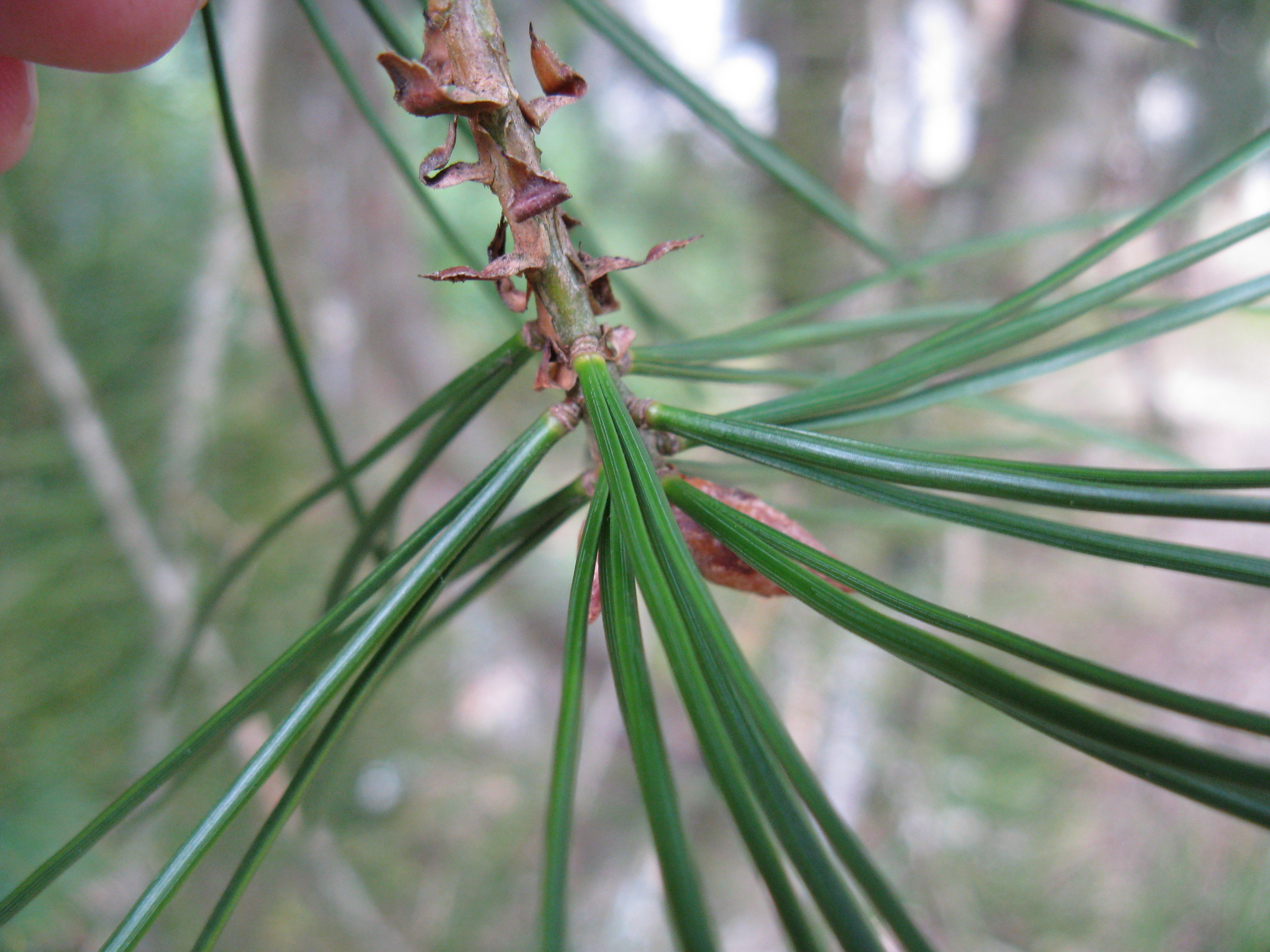 PinusBungeana